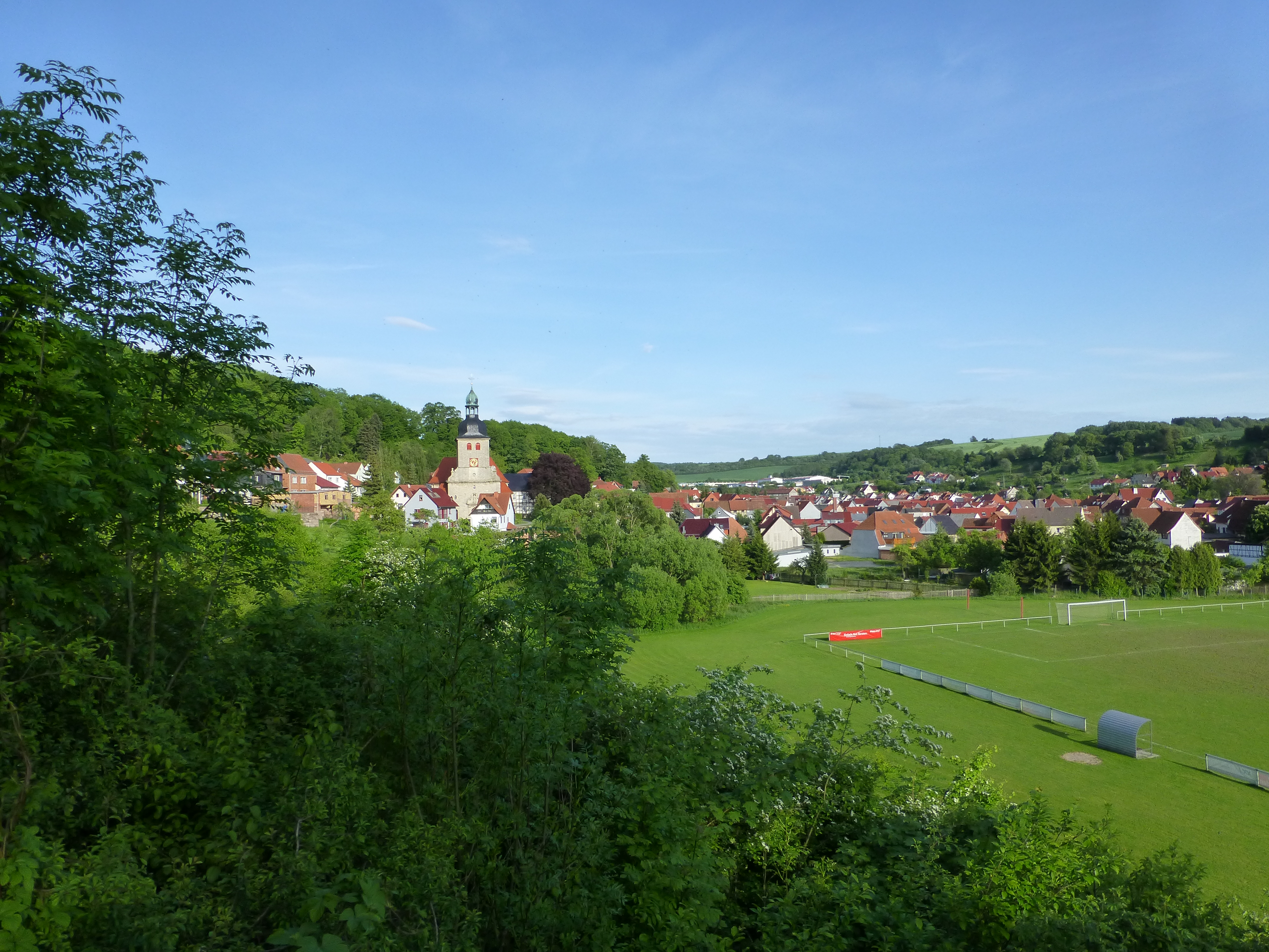 Blick auf Geisleden